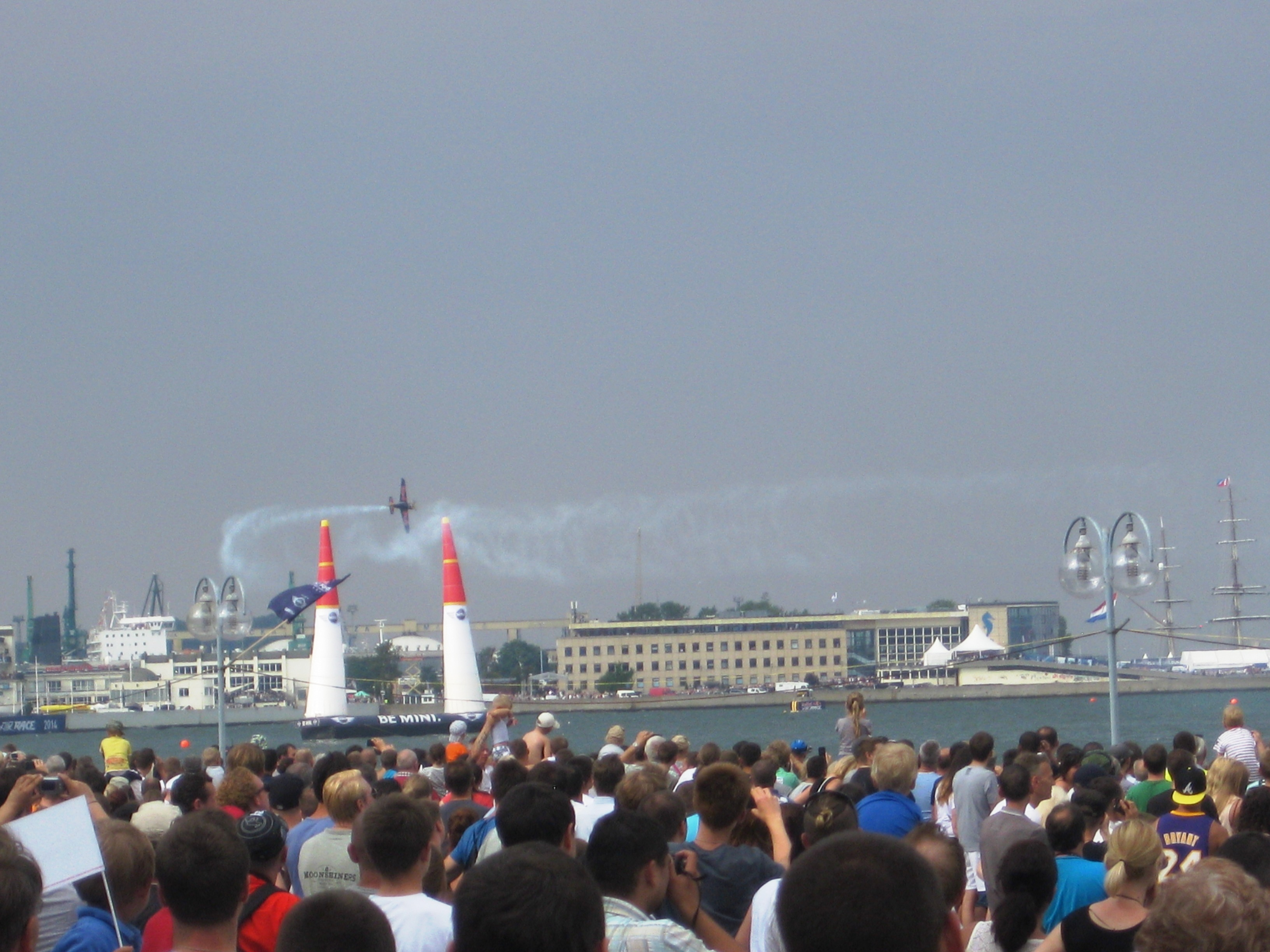 Gdynia 2014 - Red Bull Air Race